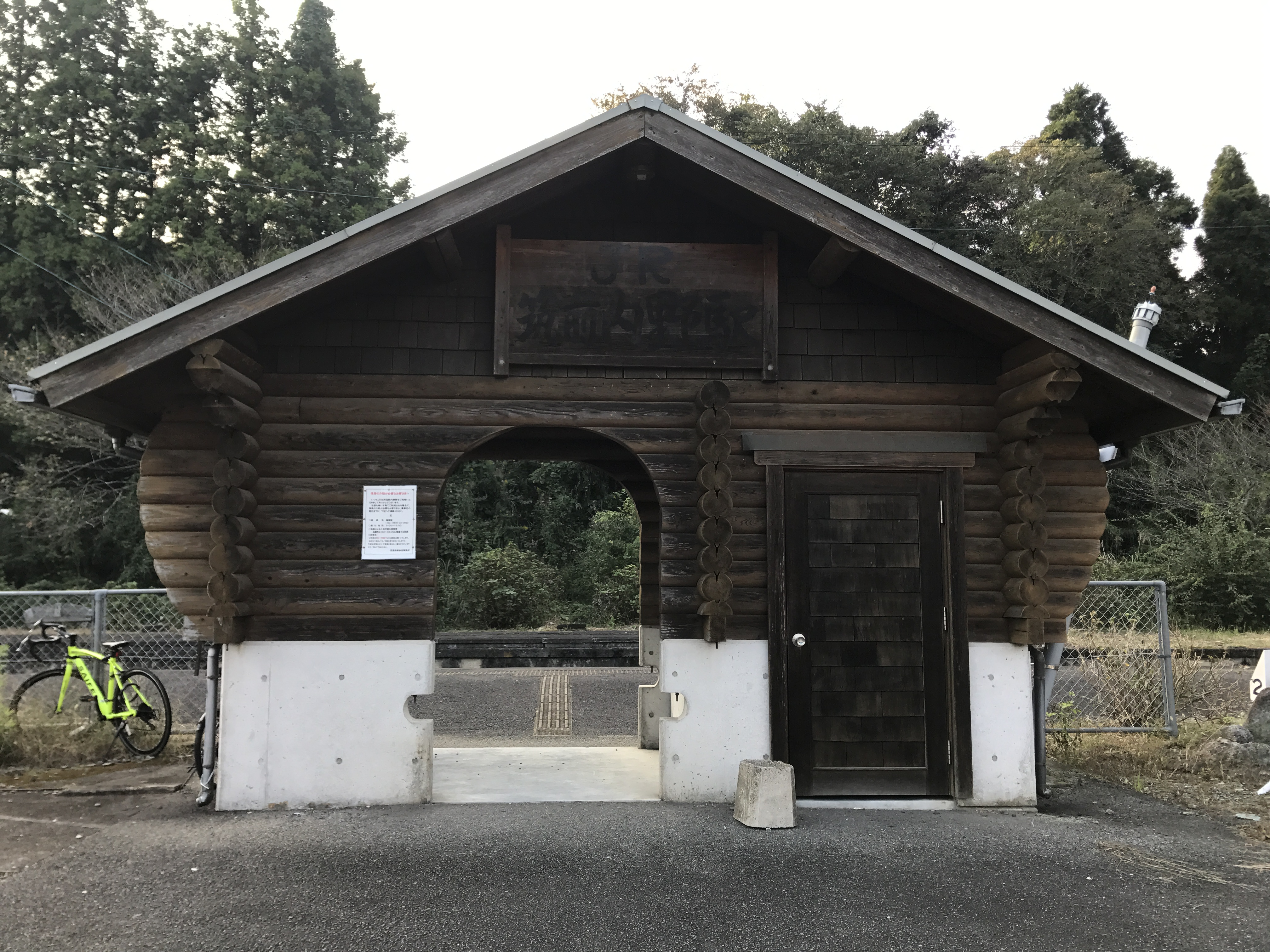 筑前内野駅駅舎